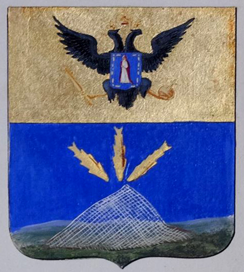 Беларуская (тарашкевіца): Паставы (Pastavy). Расейскі герб места